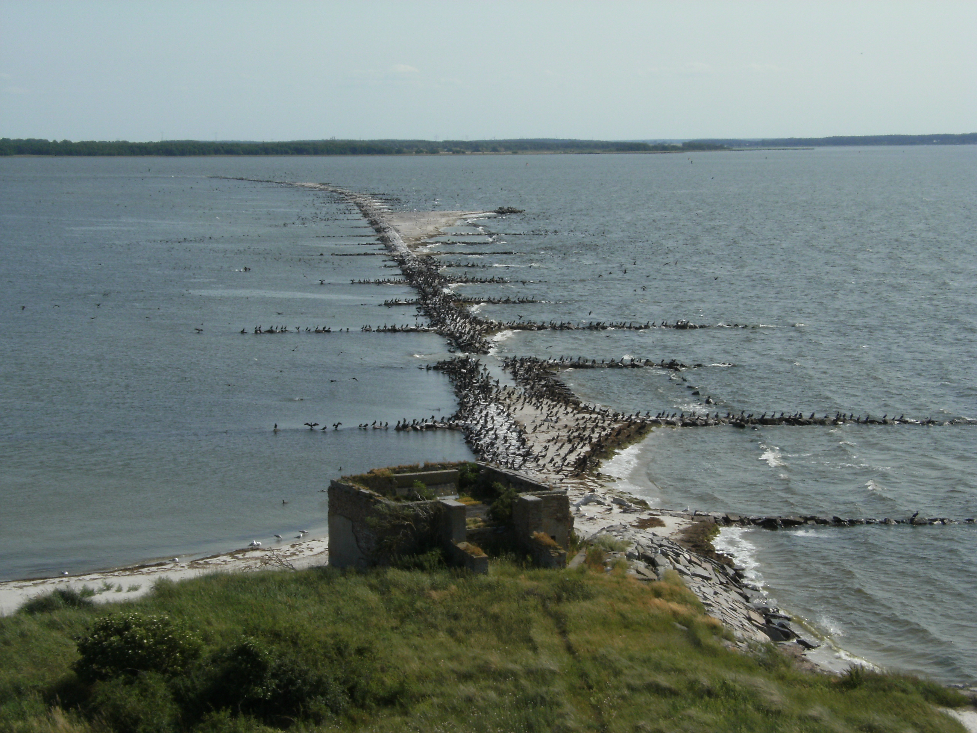 Ruden - Flakstellung (vorne), Mole mit Kormoranen